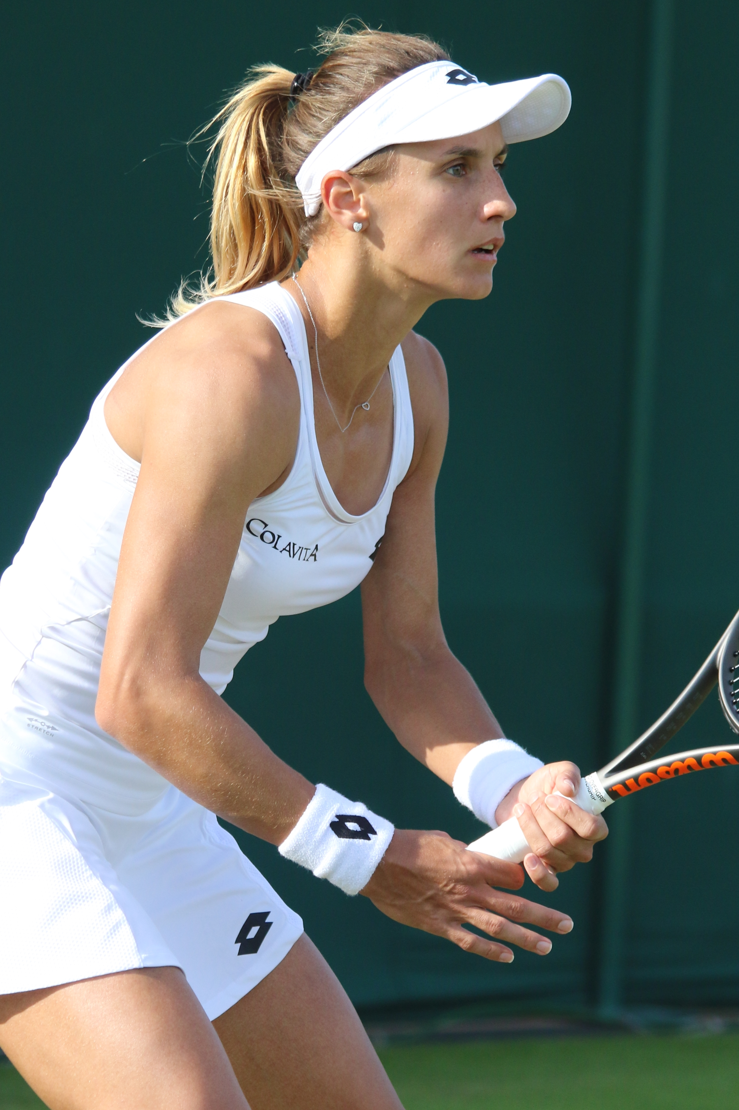 Tsurenko WM17 (3)